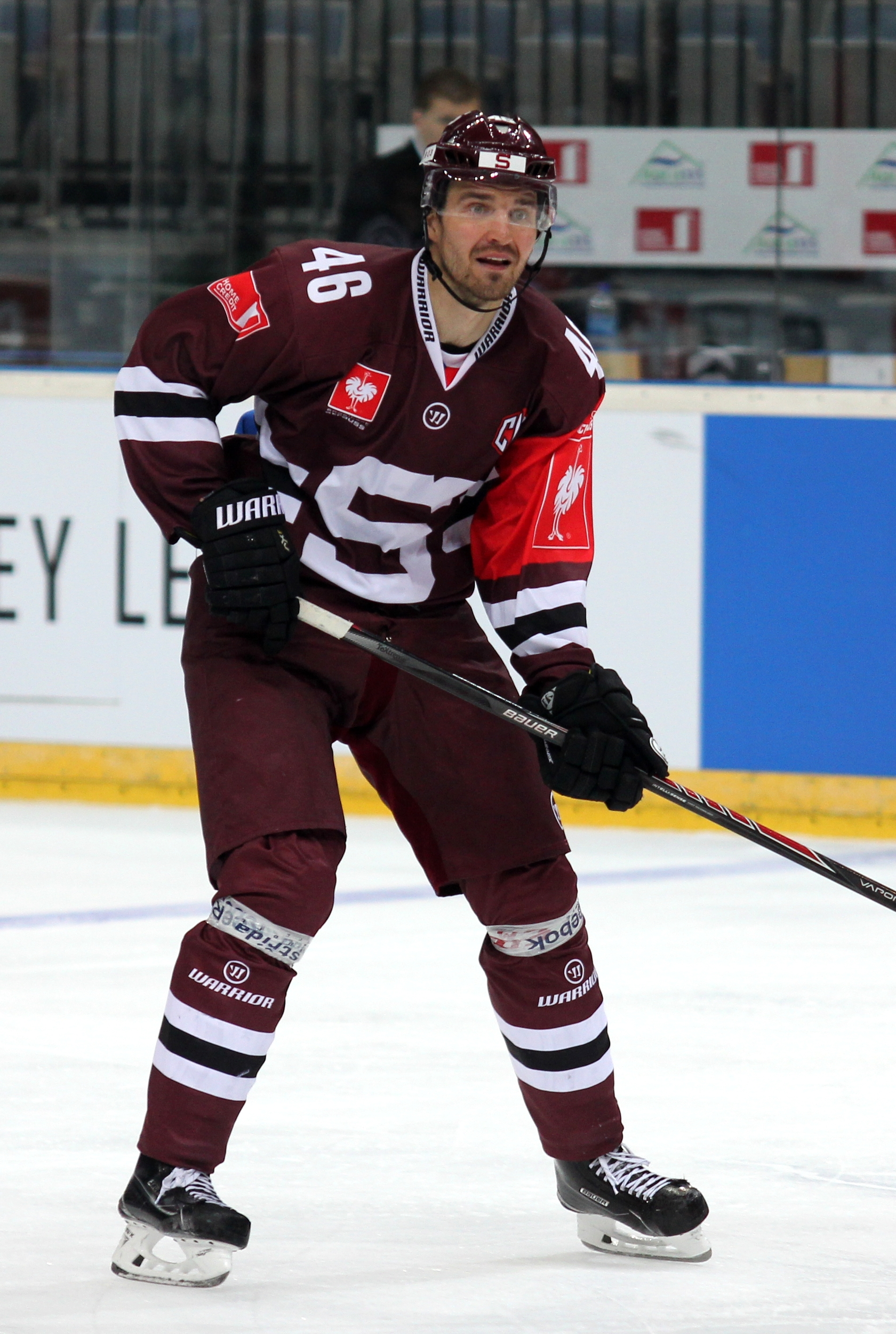 Petr Kumstát (P 46).